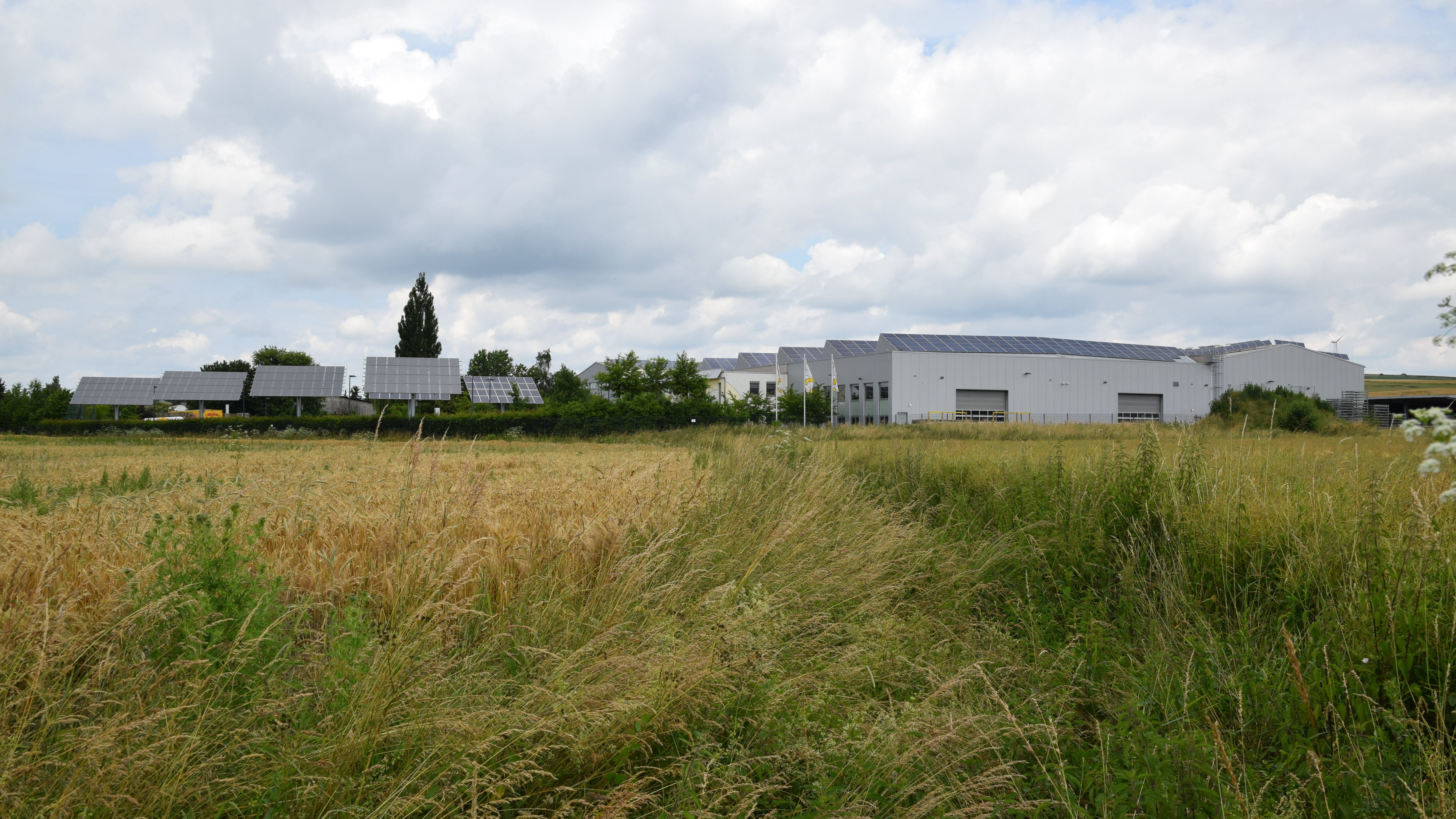 Fabrik Wagner & Co Solartechnik in Kirchhain